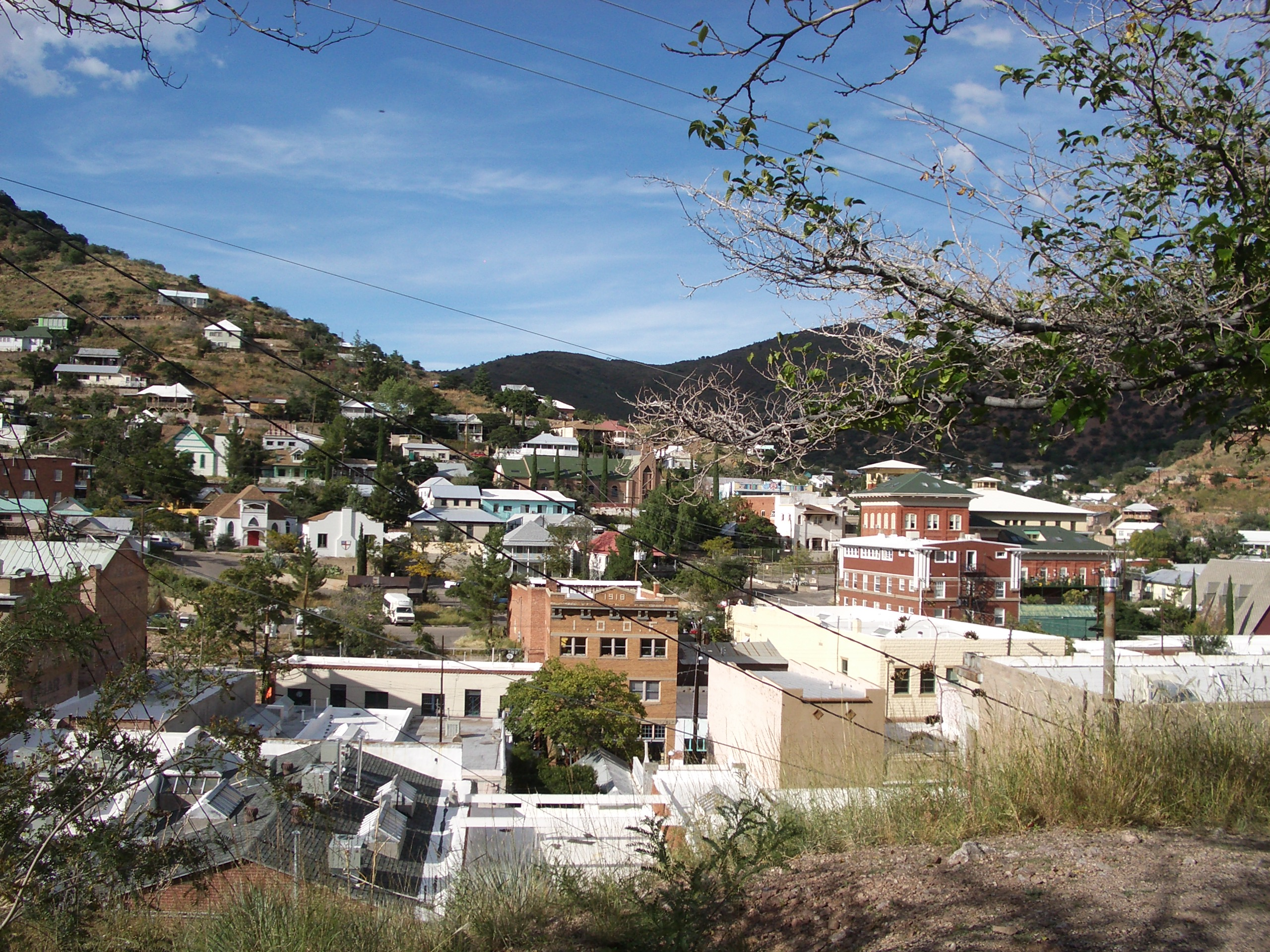 La ville de Bisbee en Arizona